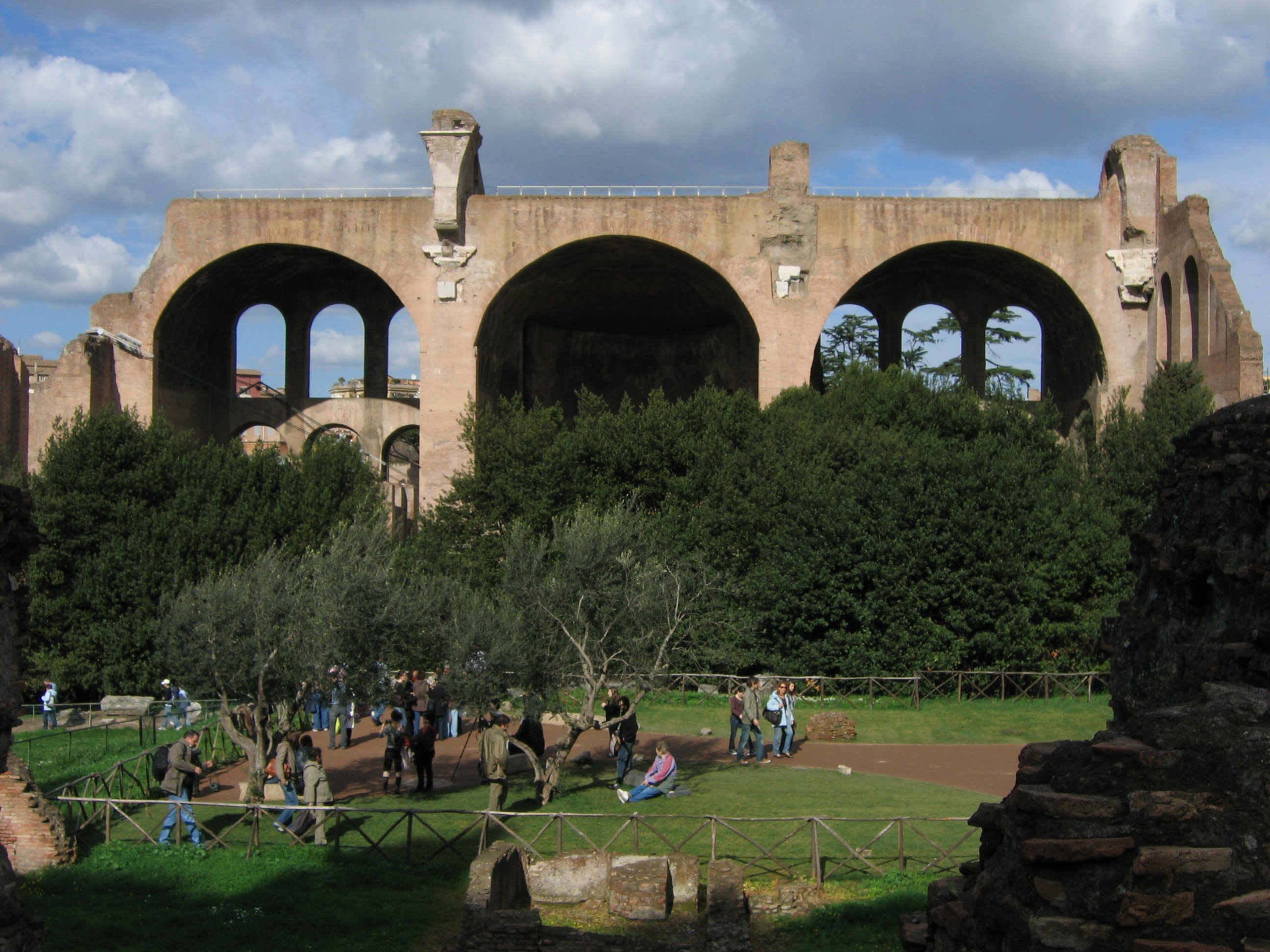 Basilica of Maxentius